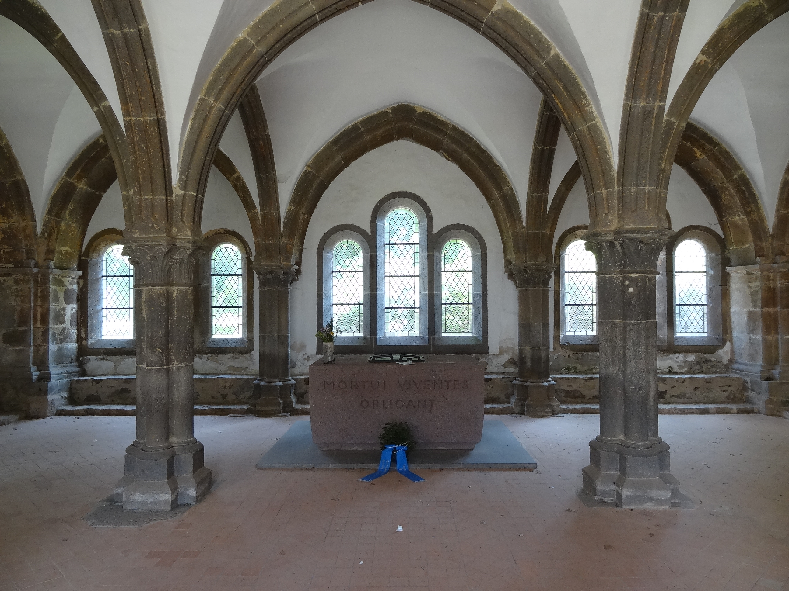 Kloster Arnsburg (Kapitelsaal)